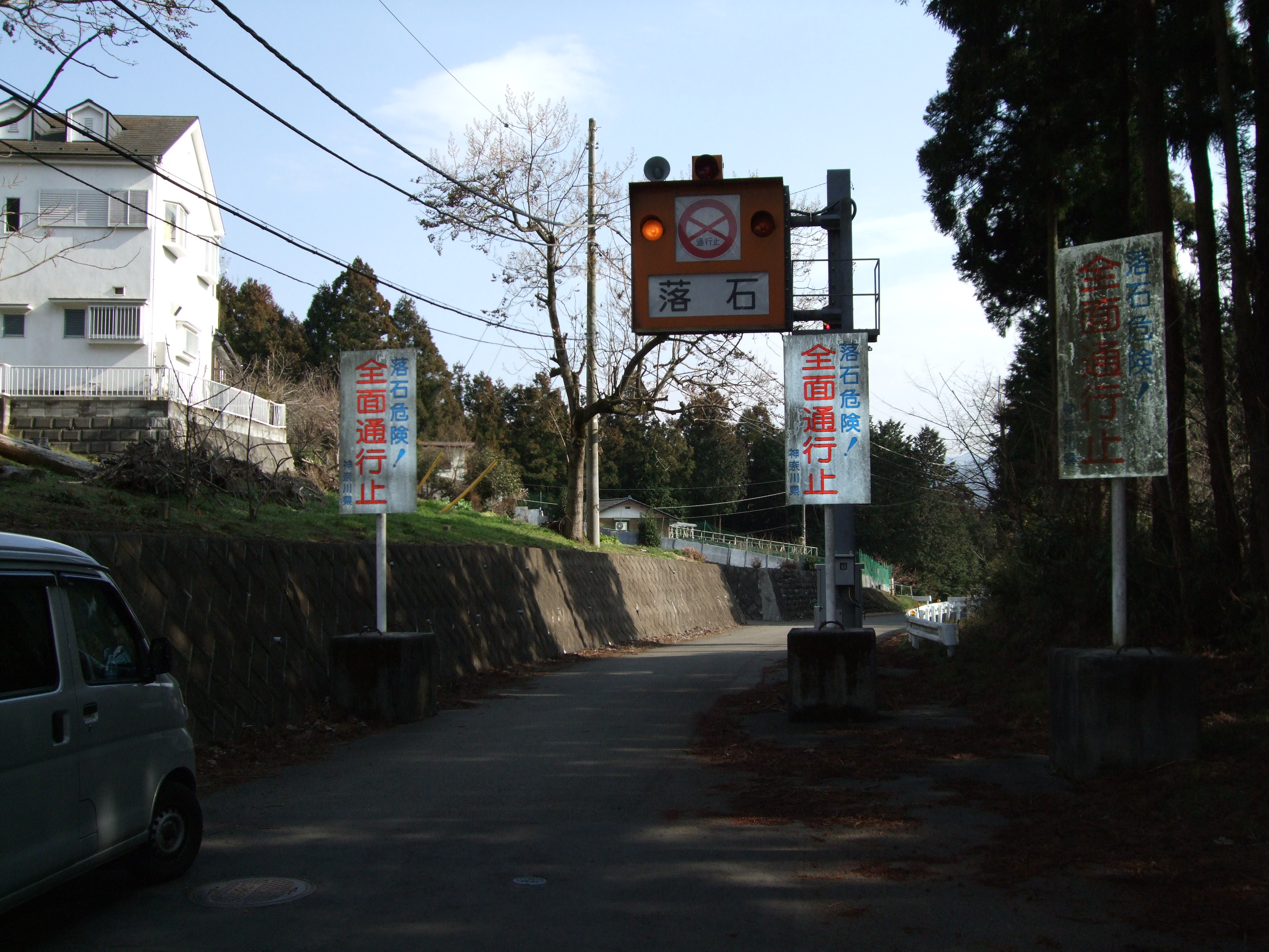 r515 Kanagawa Chigira1